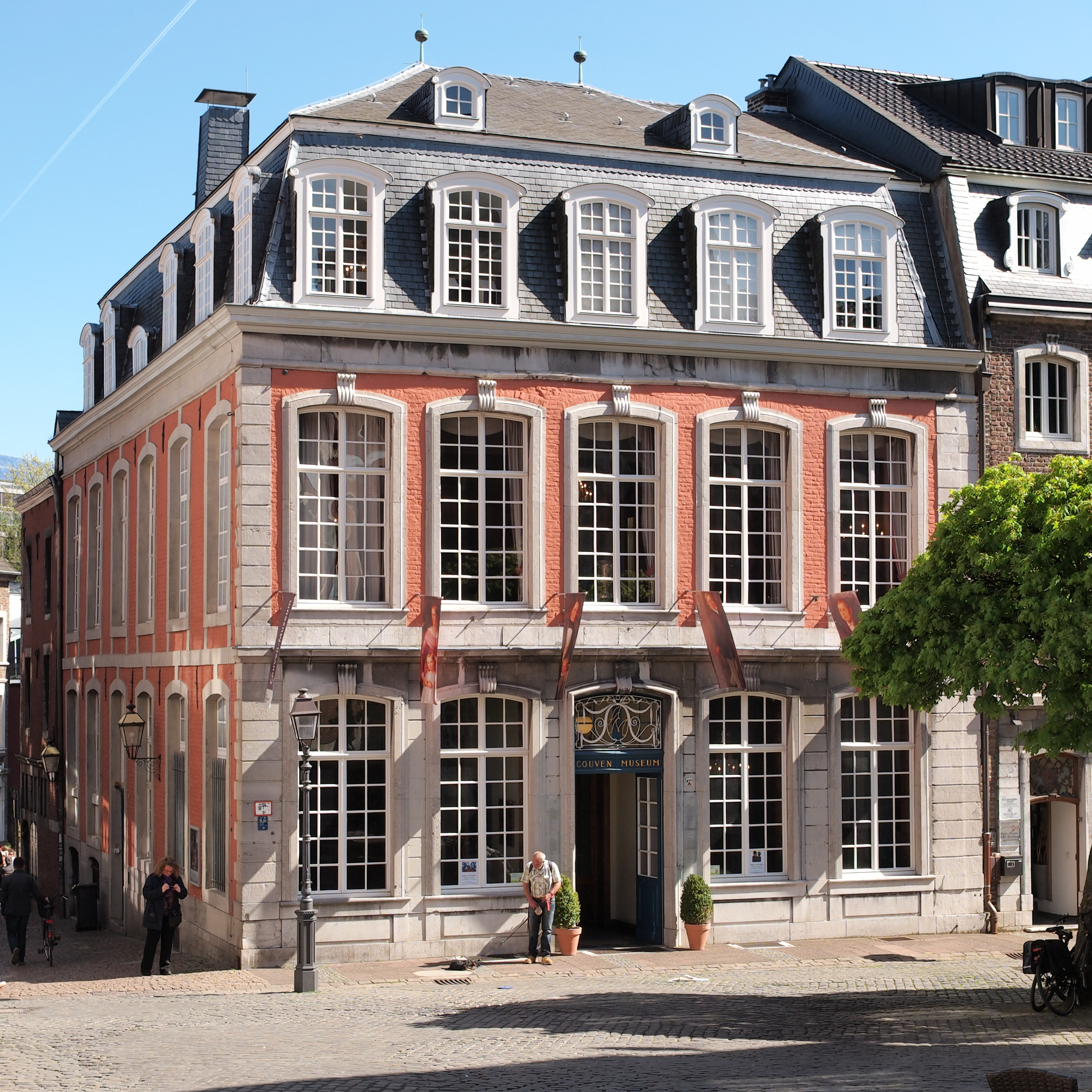 Couven Museum in Aachen, Denkmal